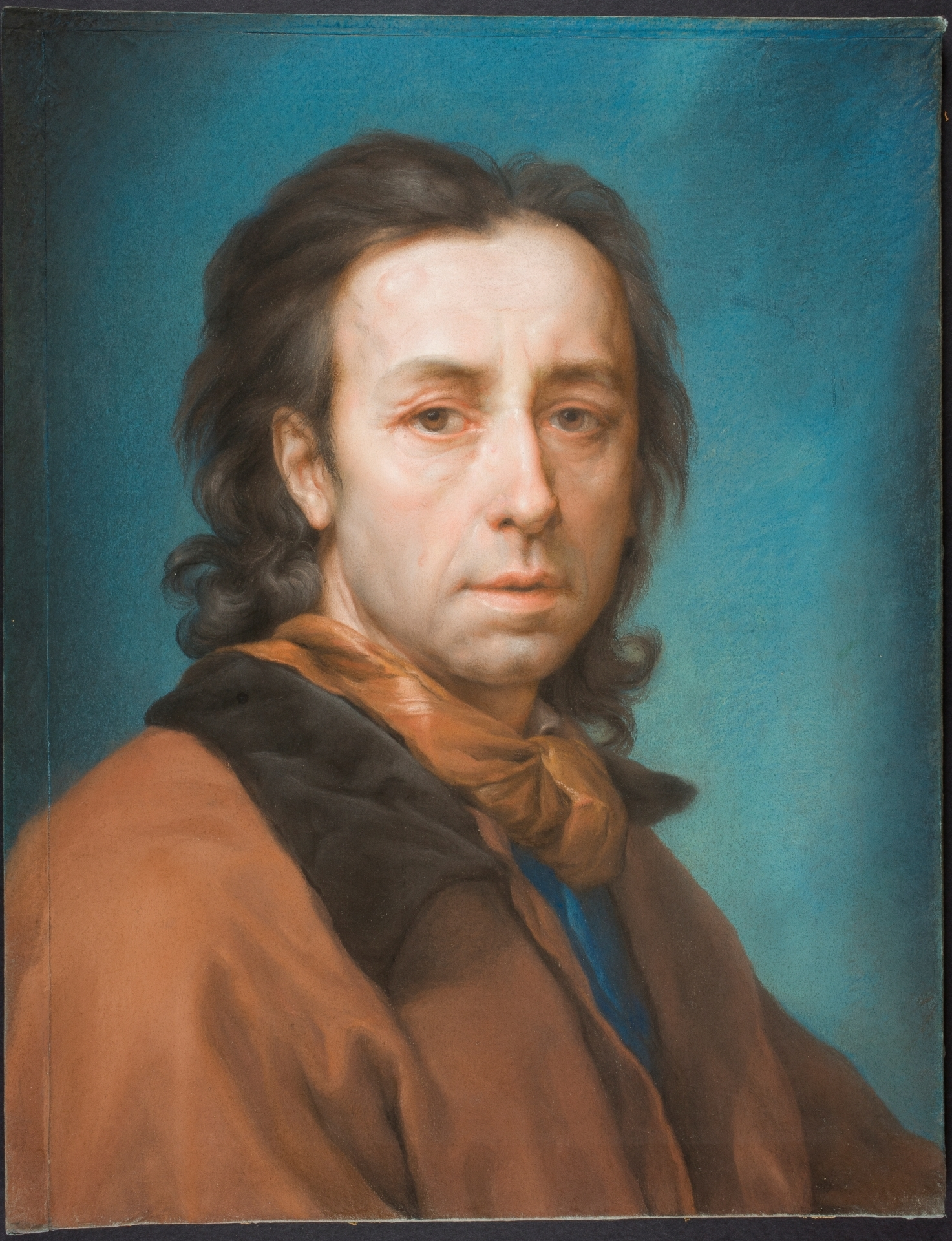 Retrato del pintor alemán Anton Raphael Mengs (1728-1779).